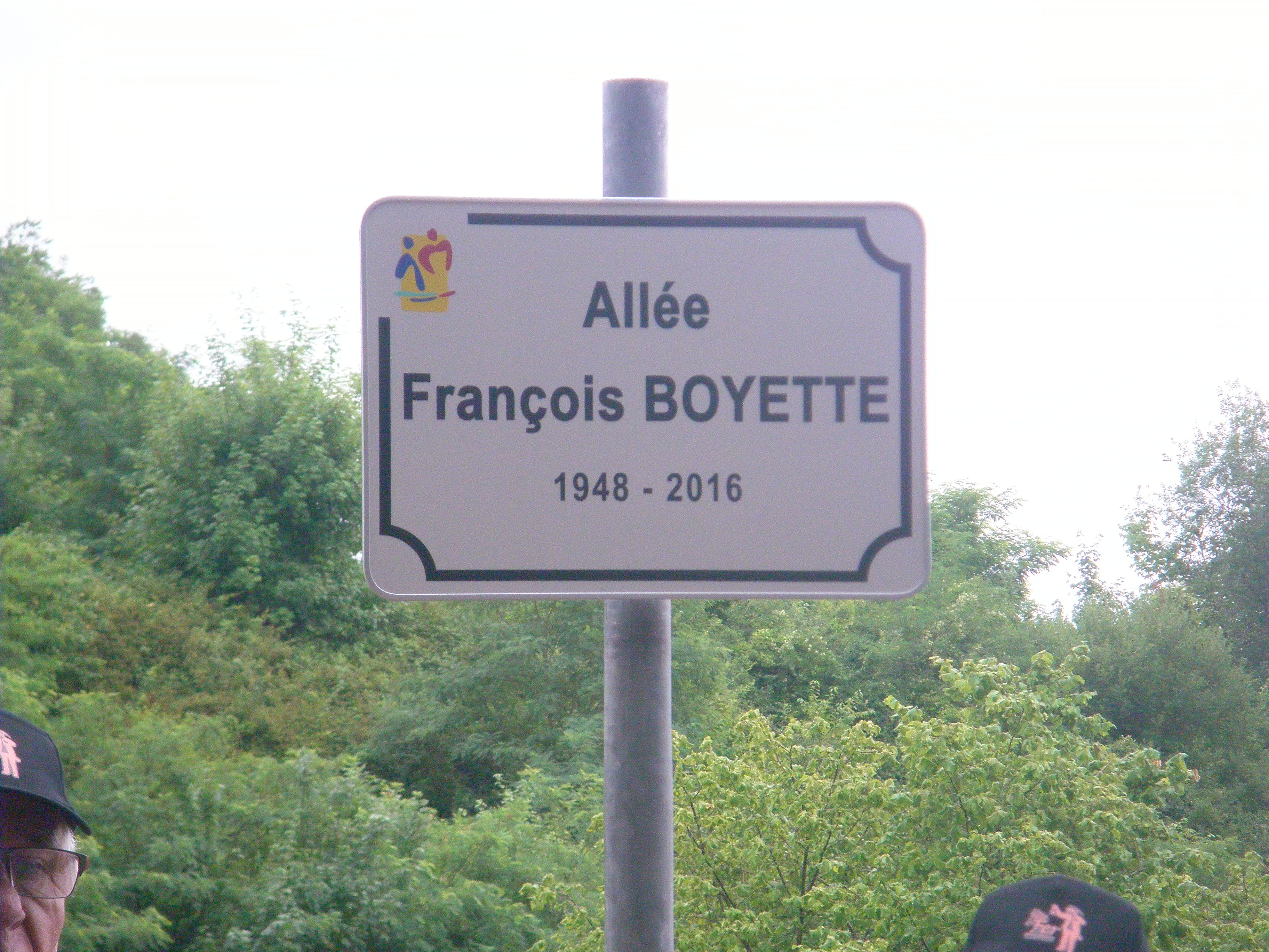 Panneau Allée François Boyette dans la commune de Neuves-Maisons (54, France)